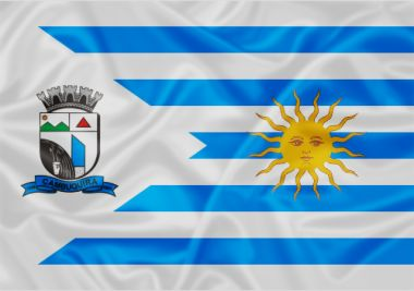 Bandeira de Cambuquira